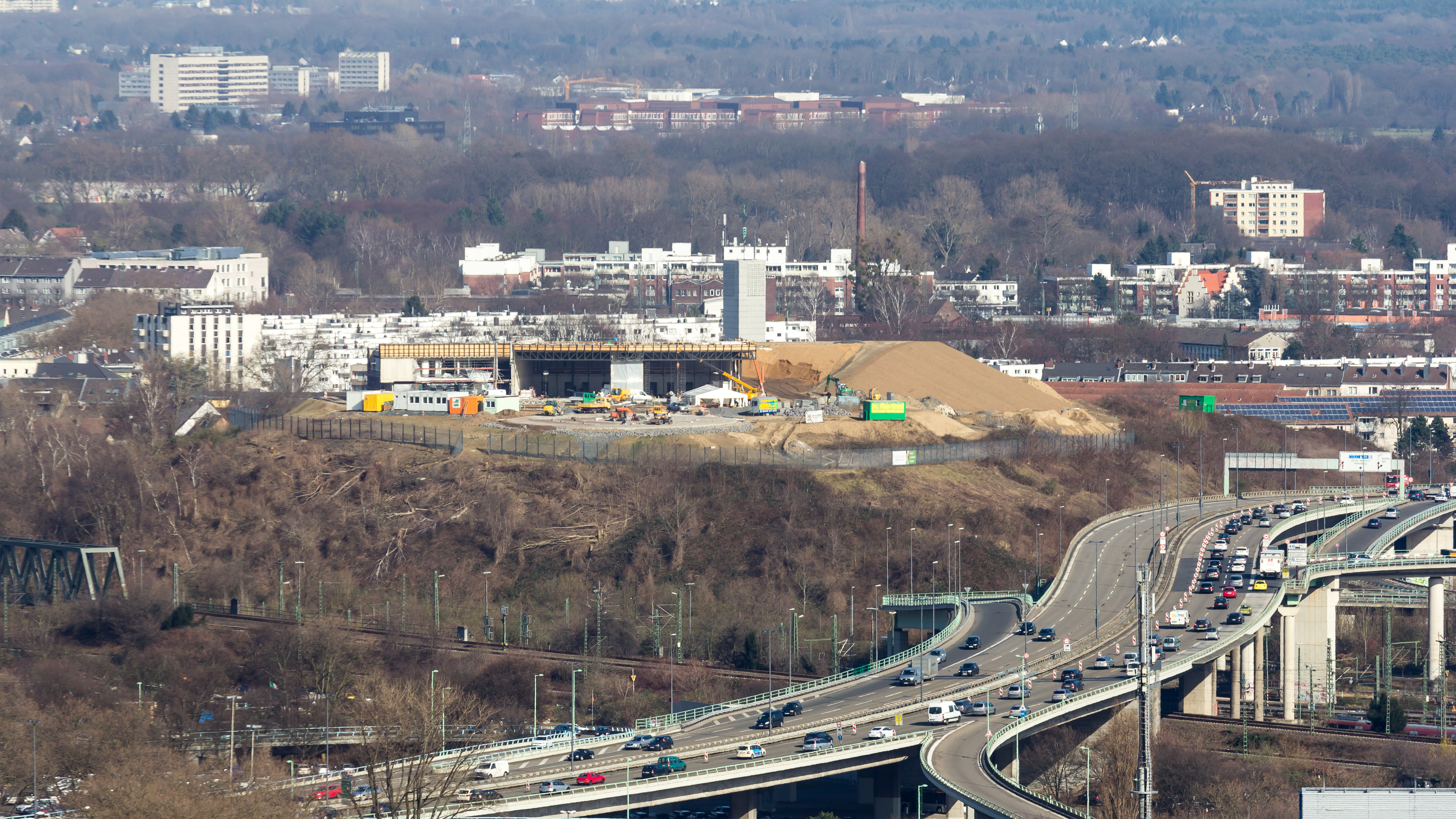 Kalkberg, Rettungshubschrauberstation im Bau, Stadtautobahn B55a, Köln. Blick vom KölnTriangle